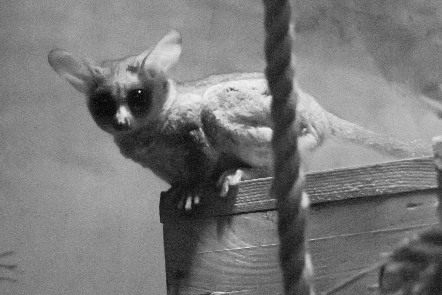 Сенегальский галаго в Московском зоопарке